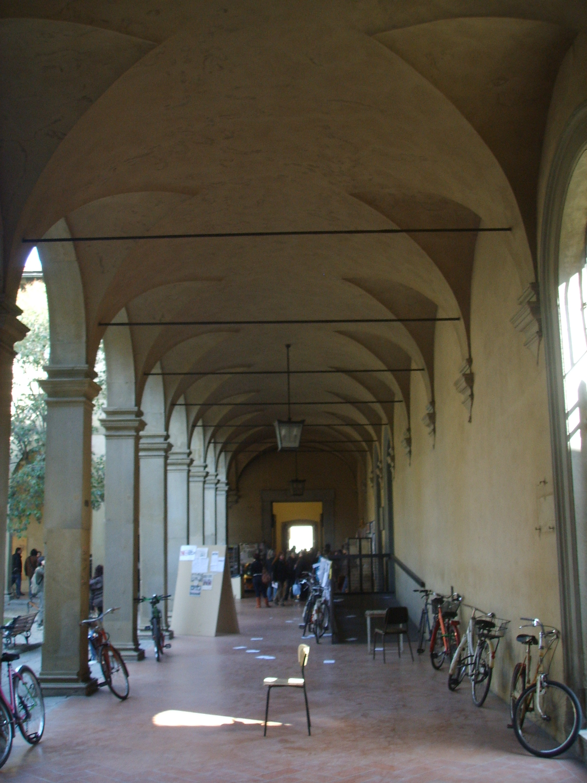 Santa_maria_degli_angeli,_chiostro_grande